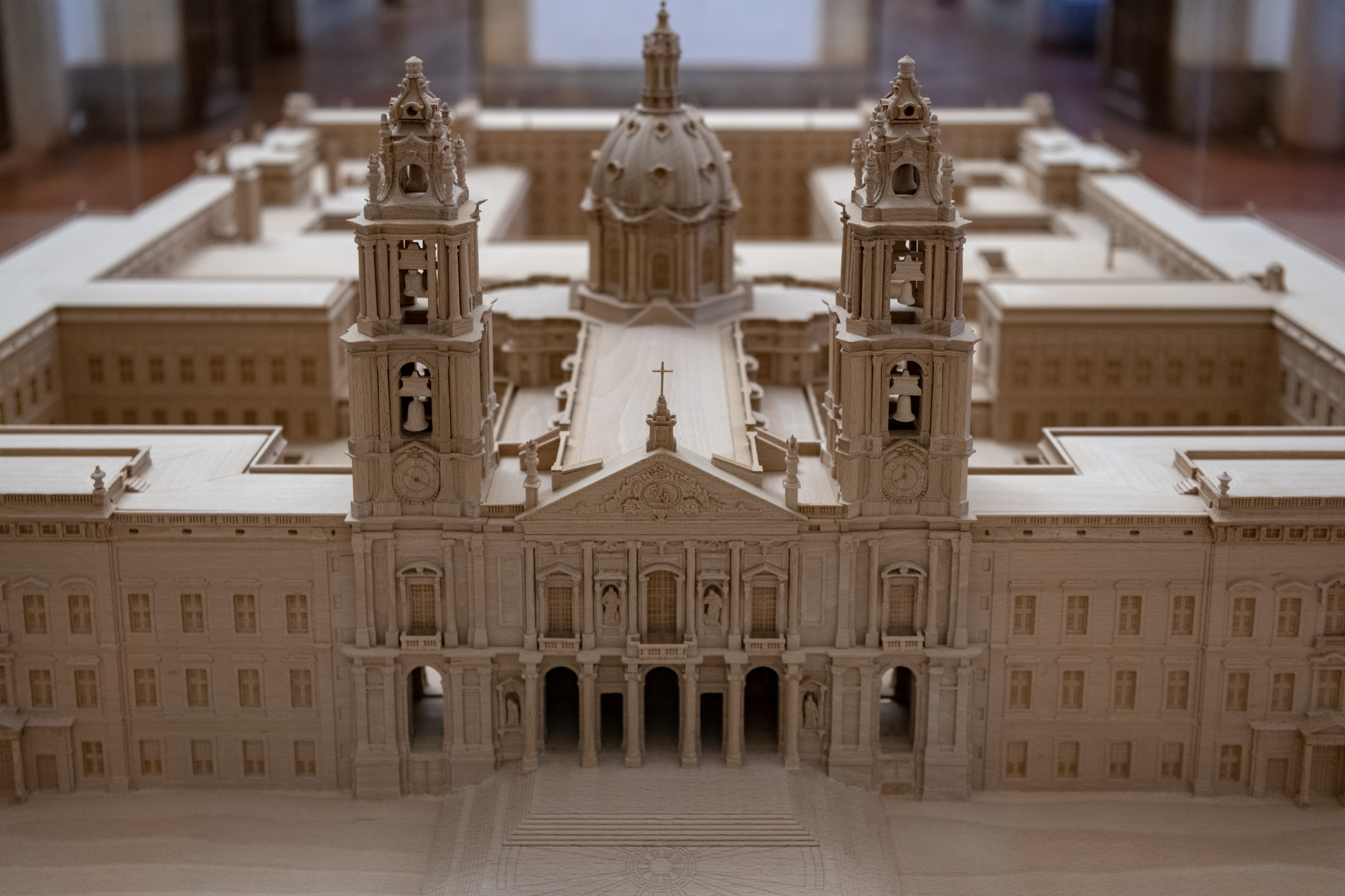 22531-Mafra